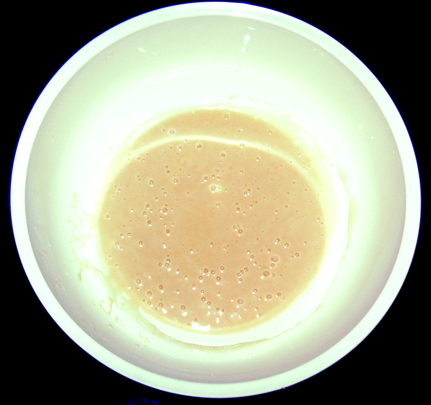 Hermann-Teig in einer Schüssel